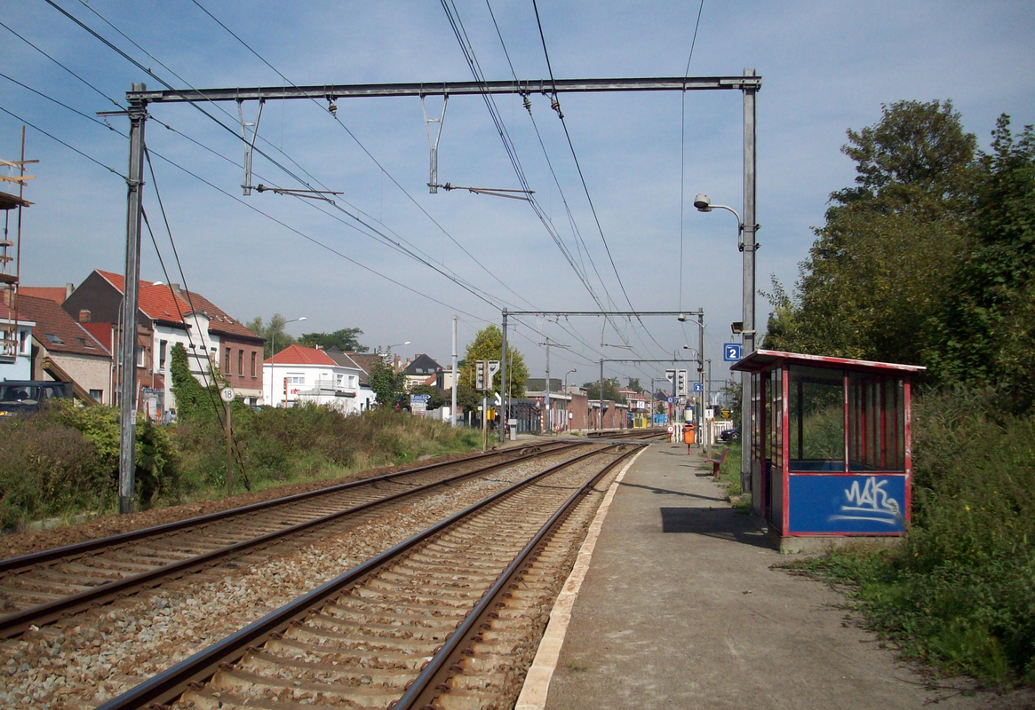 Station Hemiksem